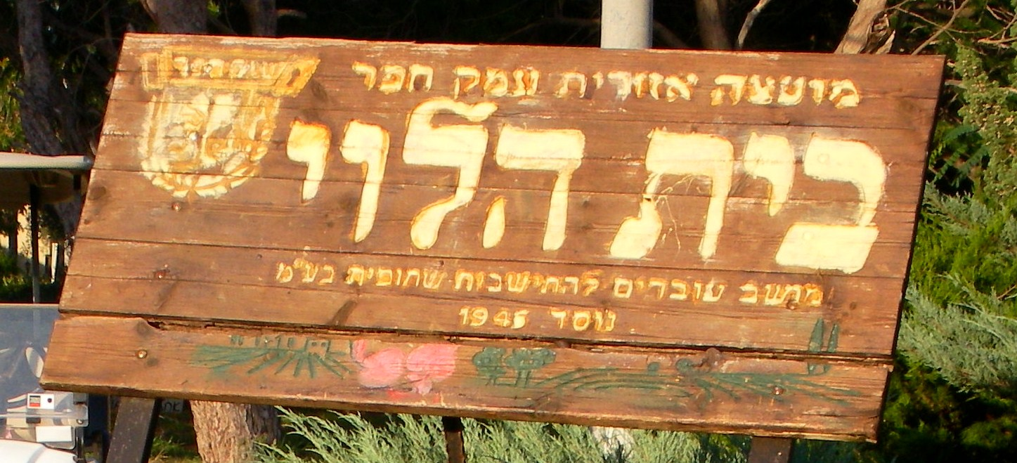 מושב בית הלוי